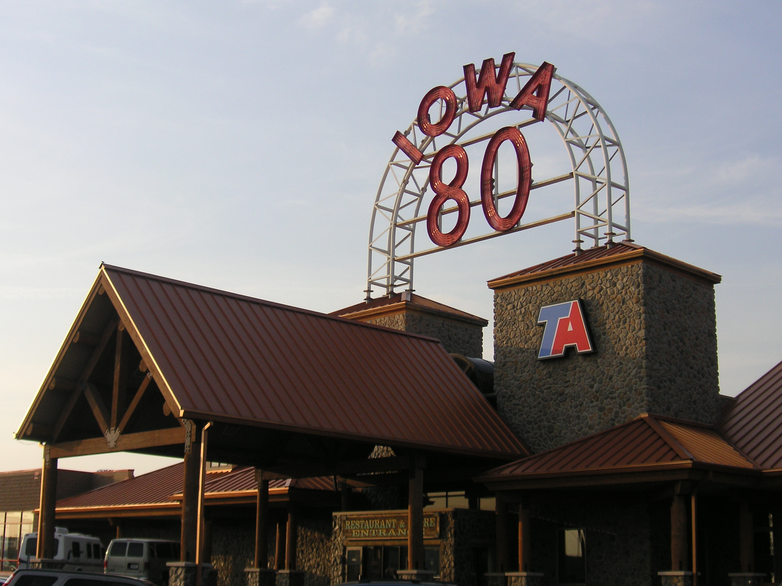 Iowa 80 truck stop, Iowa, USA.